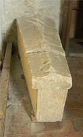 Ce sarcophage d'époque mérovingienne fut trouvé devant l'église Notre Dame de Brissarthe au moment de la réfection récente de la place "Robert le Fort".